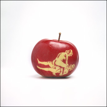 Œuvre : Pommes Libertines, de l'artiste plasticien Richard Conte.